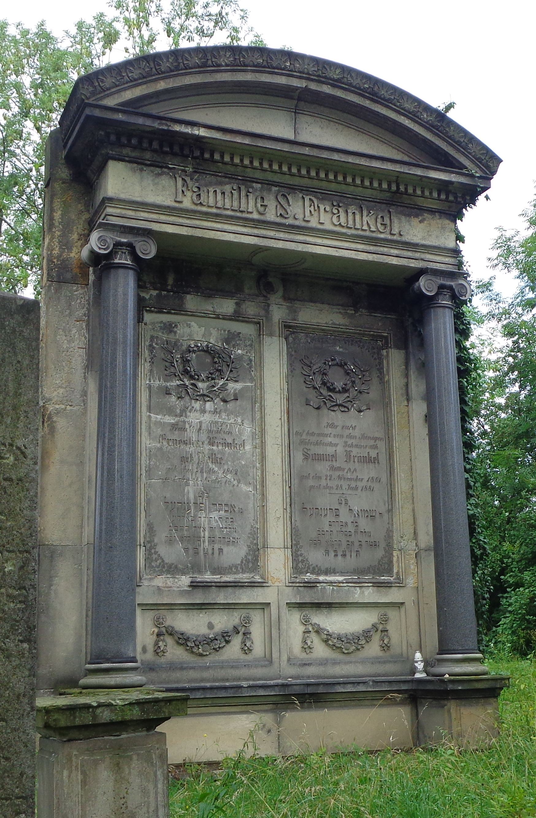 Grobowiec Samuela Fränkla i jego żony Esther (z domu Polke).